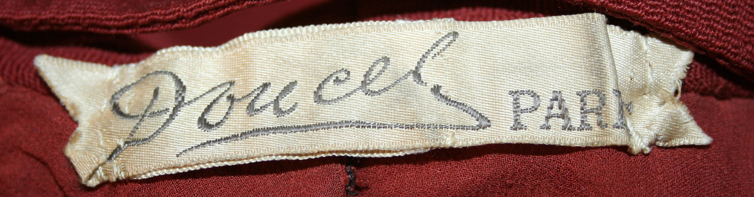 French; Ensemble